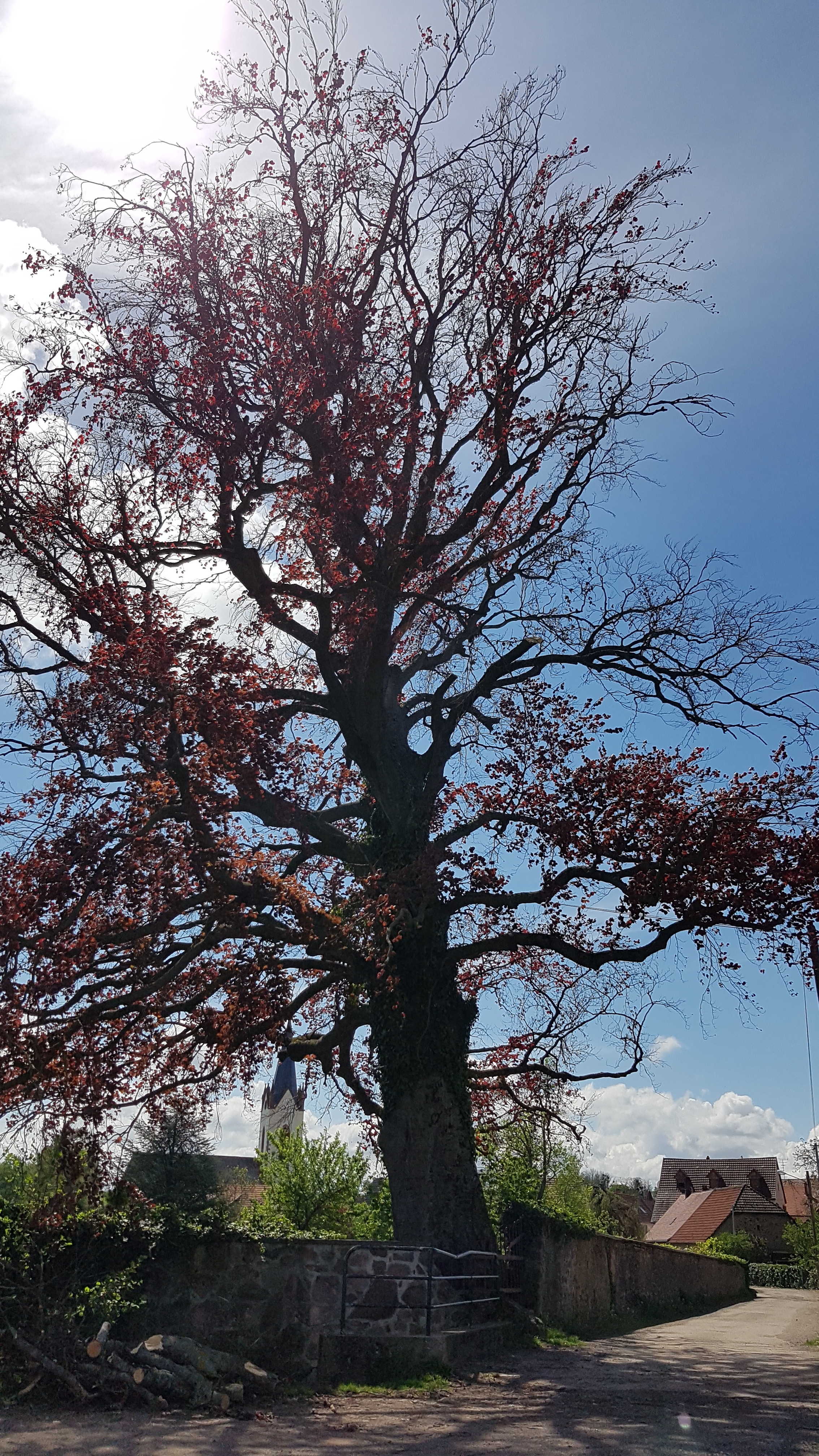 Arbre classé" Arbre Remarquable" planté par les Pépinières Baumann de Bollwiller, propriétaire du château de Hartmannswiller vers 1810. Son nom latin est "Fagus sylvatica purpurea", fagus est dérivé du grec « fagos », qui signifie manger. Son espèce, sylvatica vient du latin silva - forêt.